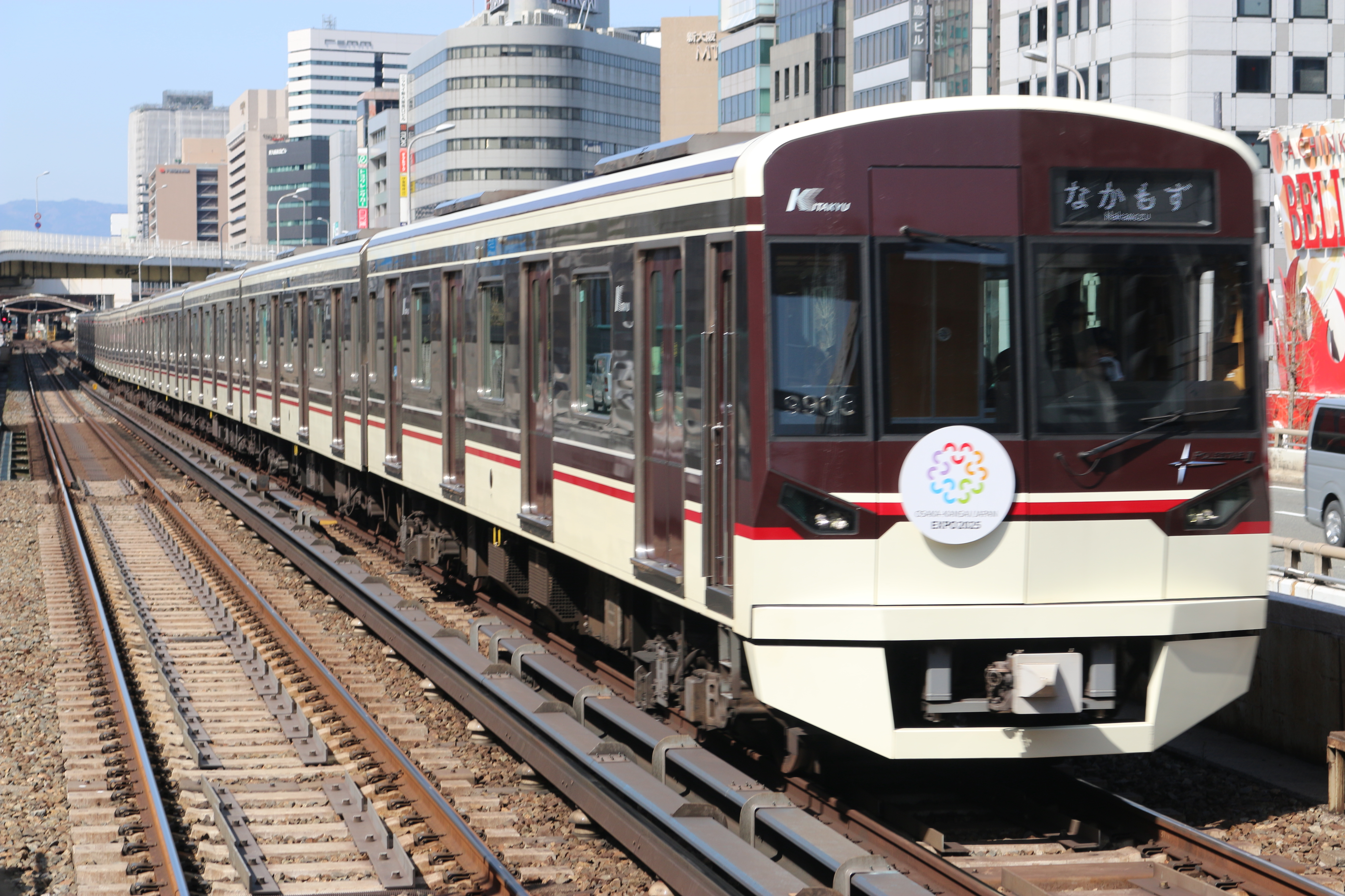 北大阪急行電鉄9000形 9003編成 西中島南方駅にて。